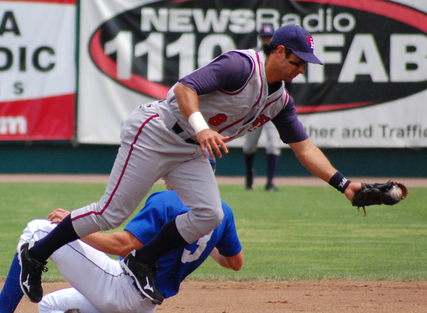 Matt Kata